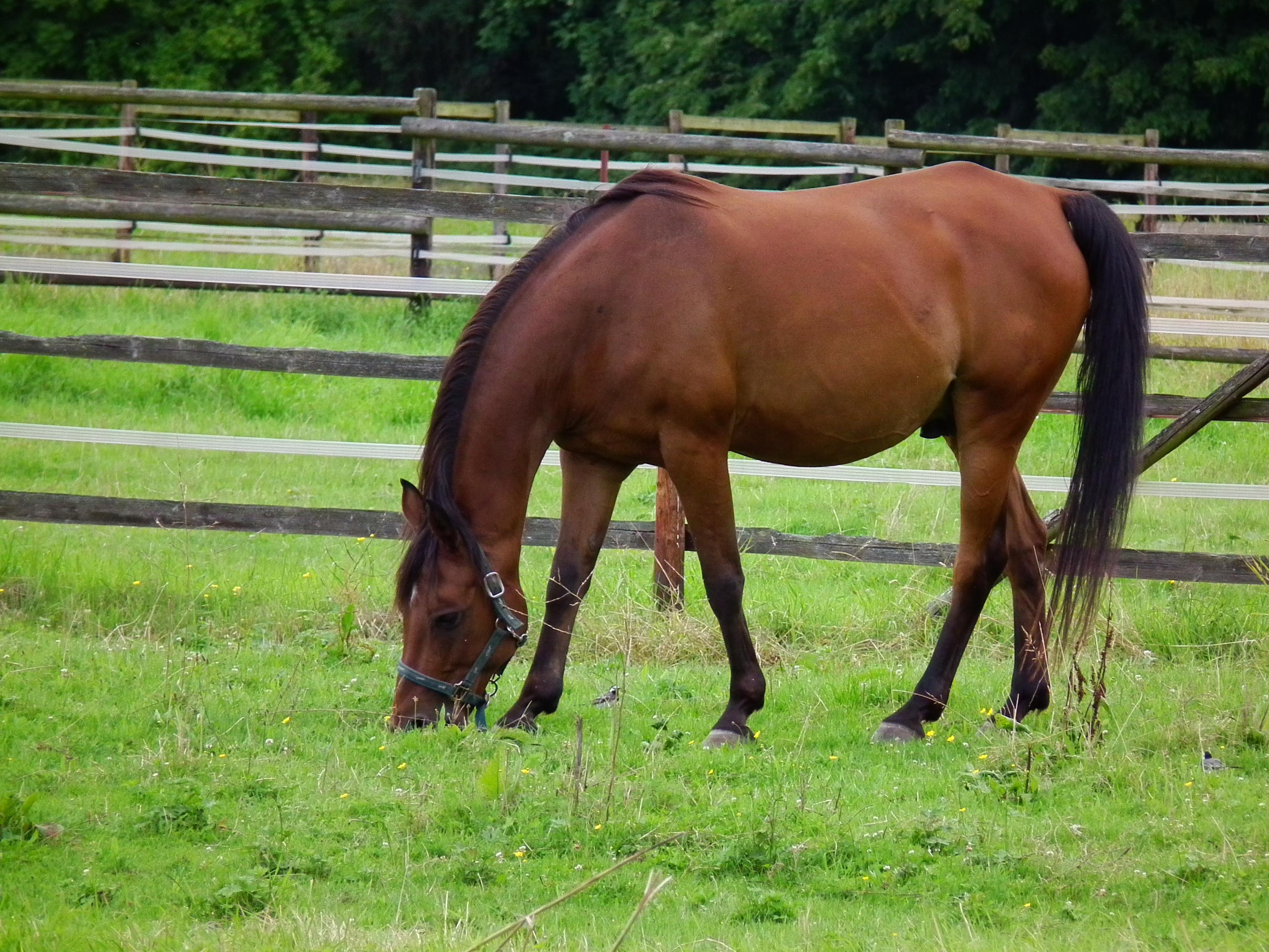 Grasendes Pferd auf einer Koppel, begleitet von Bachstelzen (Motacilla alba), fotografiert in der Nähe von Bad Schönborn (Baden-Württemberg, Deutschland)